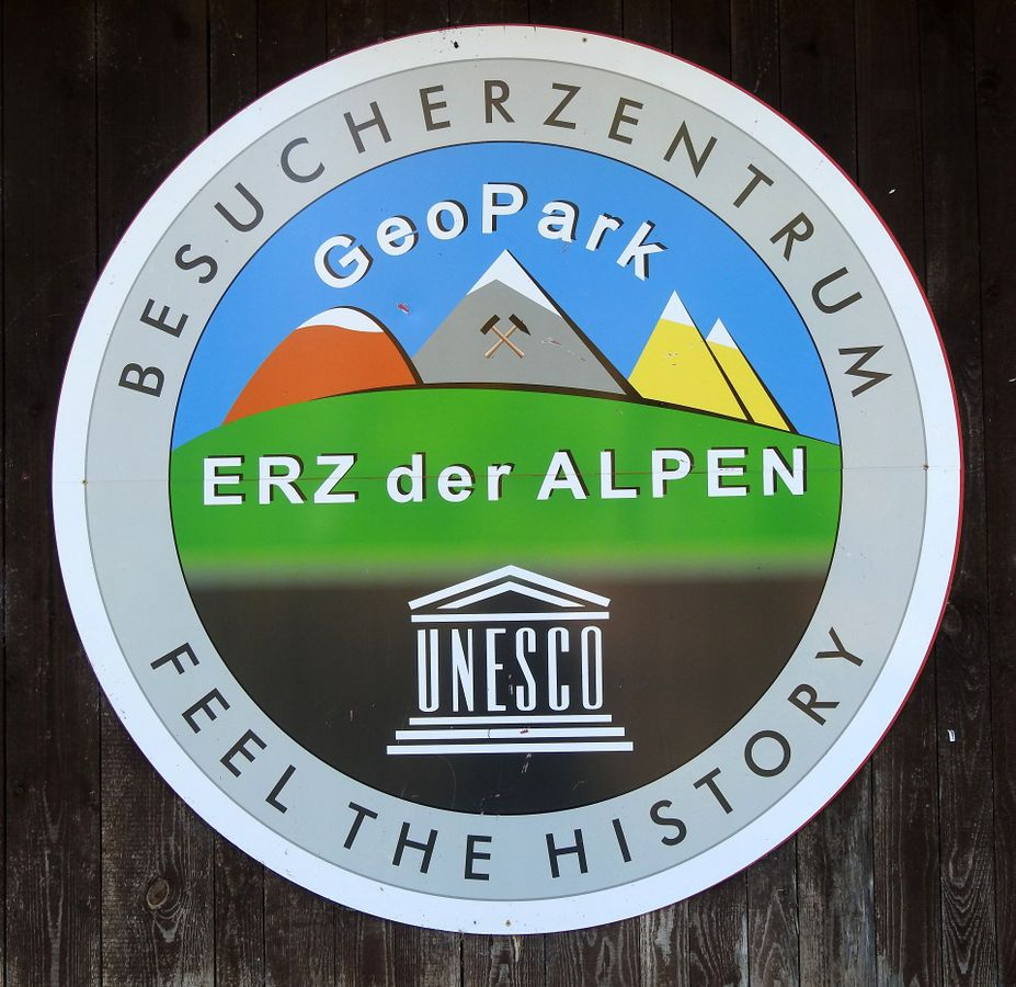 Logo Erz der Alpen